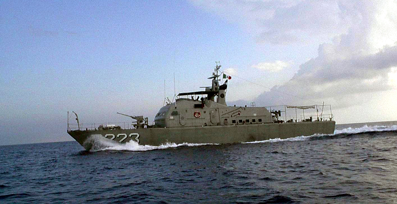 Patrulla Costera Clase Azteca ARM Tamaulipas